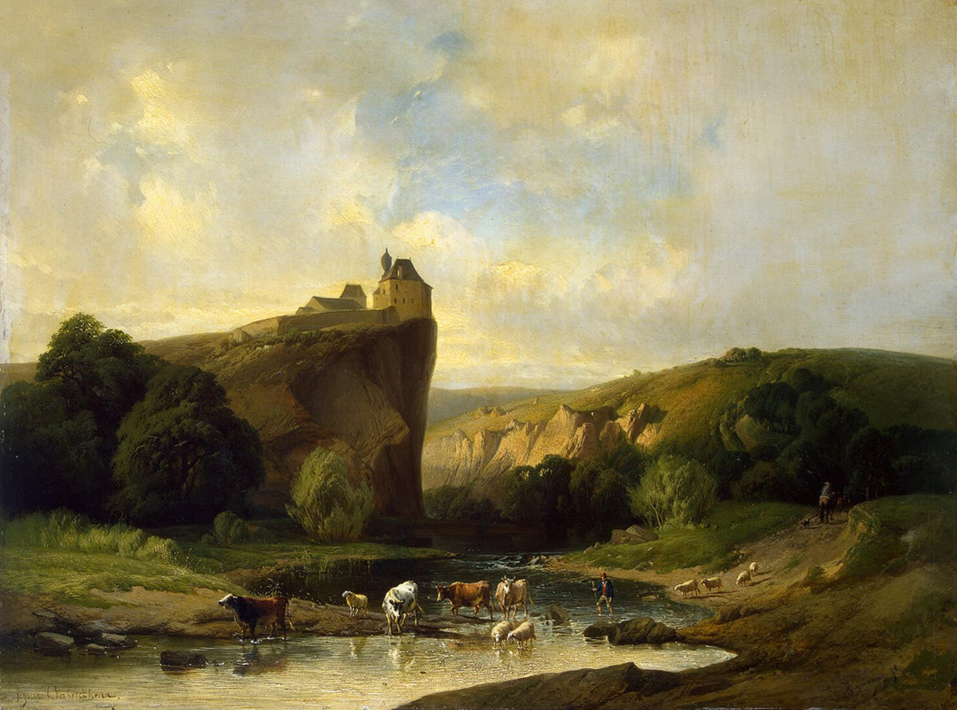 Un gué sur la Lesse à Walzin. Huile sur panneau de bois par Joseph Quinaux et Eugène Verboeckhoven.